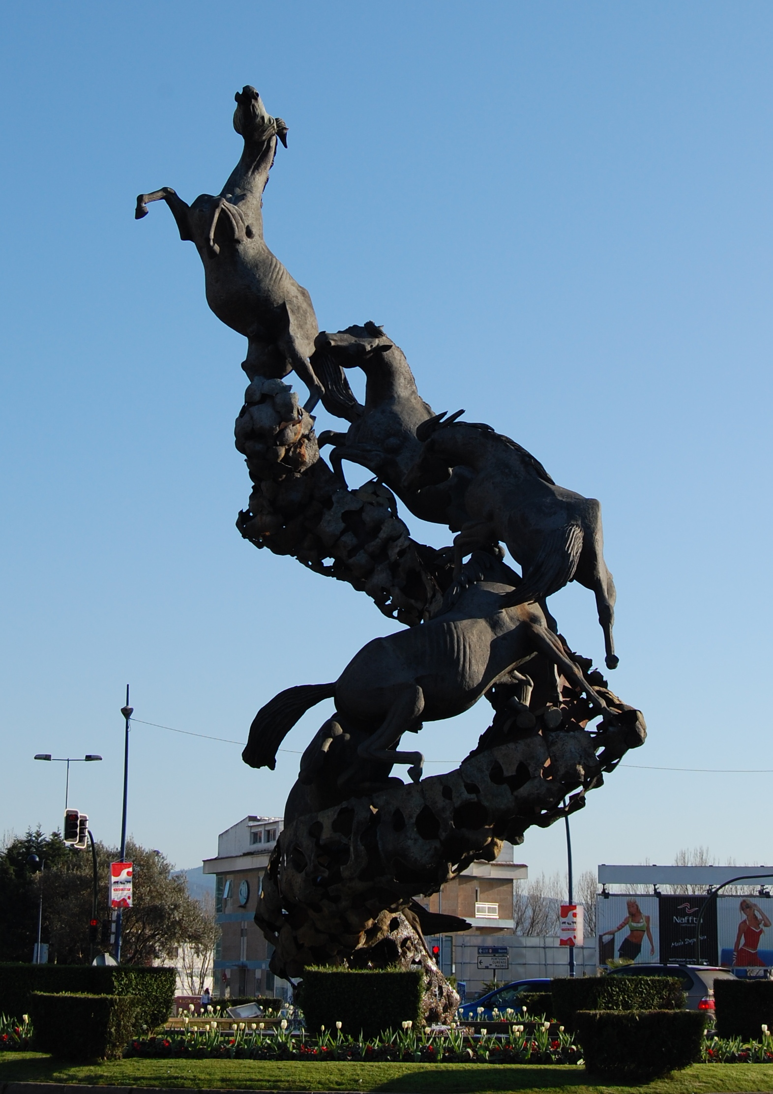 Escultura na Praça de Espanha em Vigo.